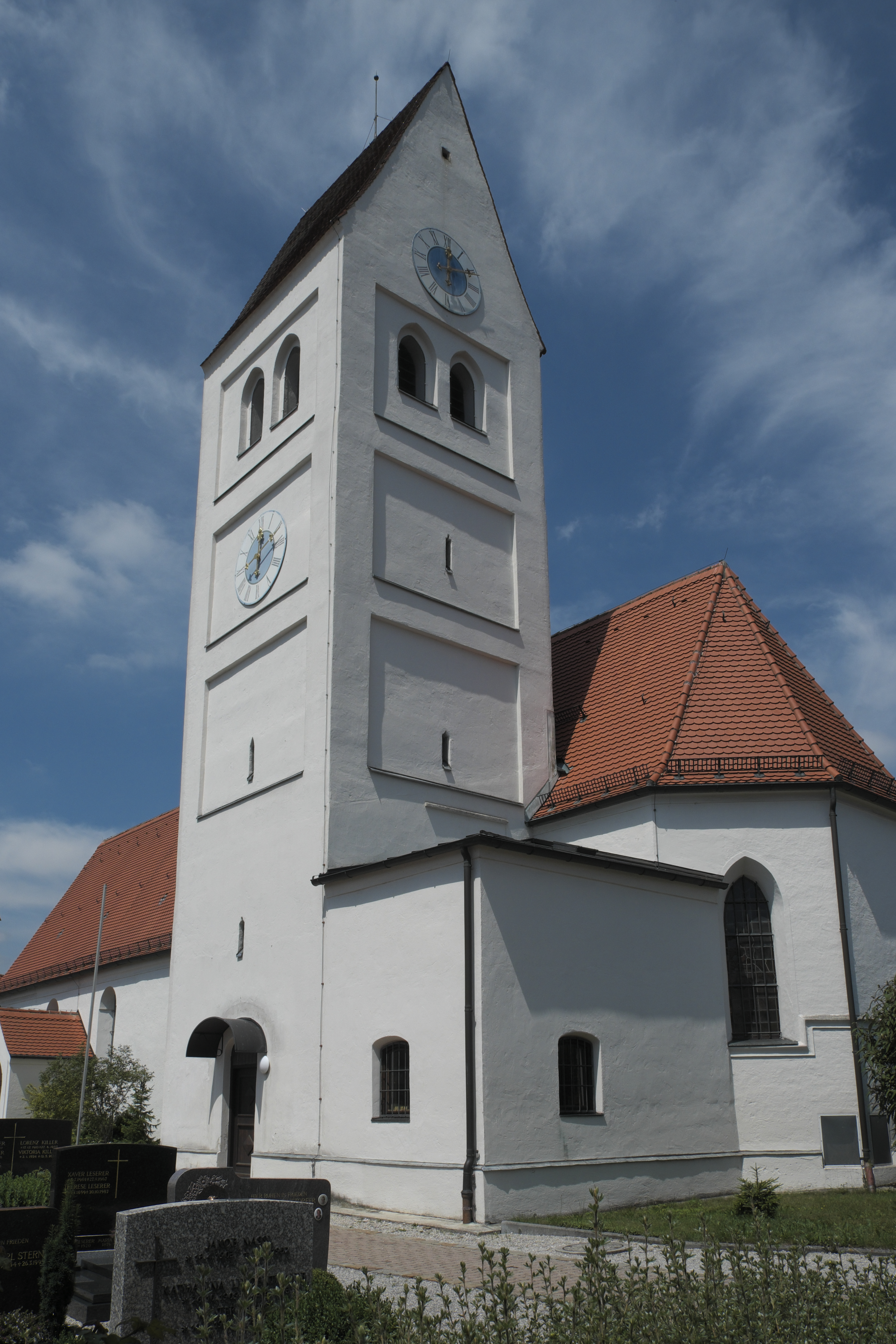 Katholische Pfarrkirche St. Jakob in Unterpfaffenhofen (Germering) im Landkreis Fürstenfeldbruck (Bayern/Deutschland)